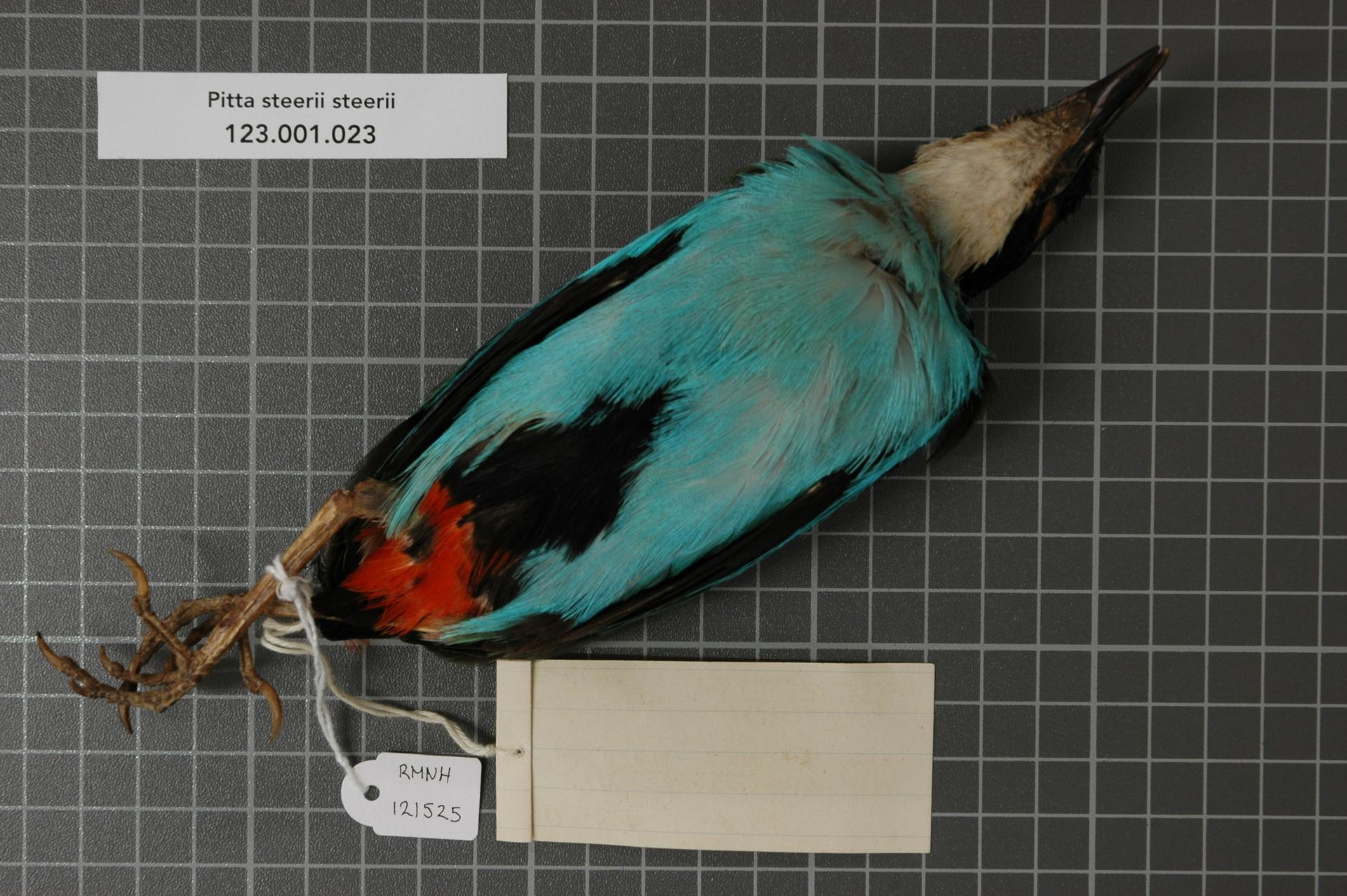 Pitta steerii steerii (Sharpe, 1876)